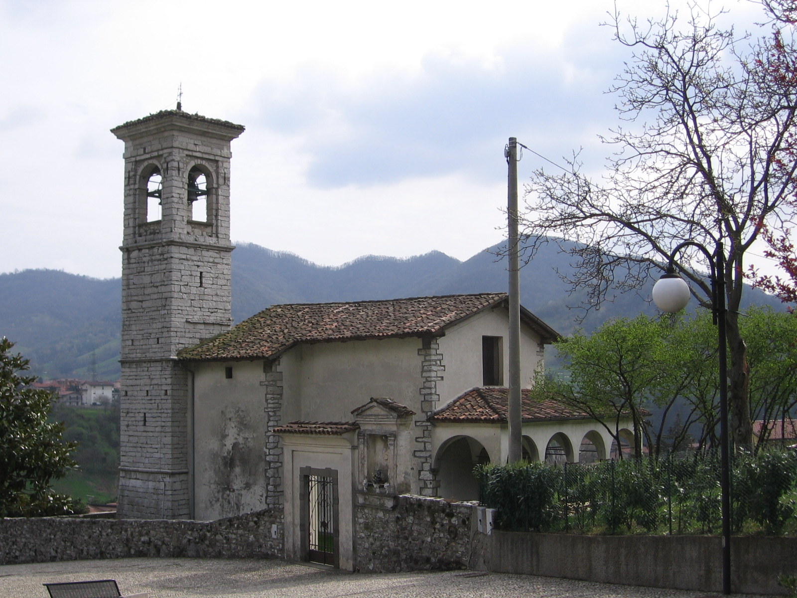 Santuario della Madonna di San Martino, Vigano San Martino, Bergamo, Italia